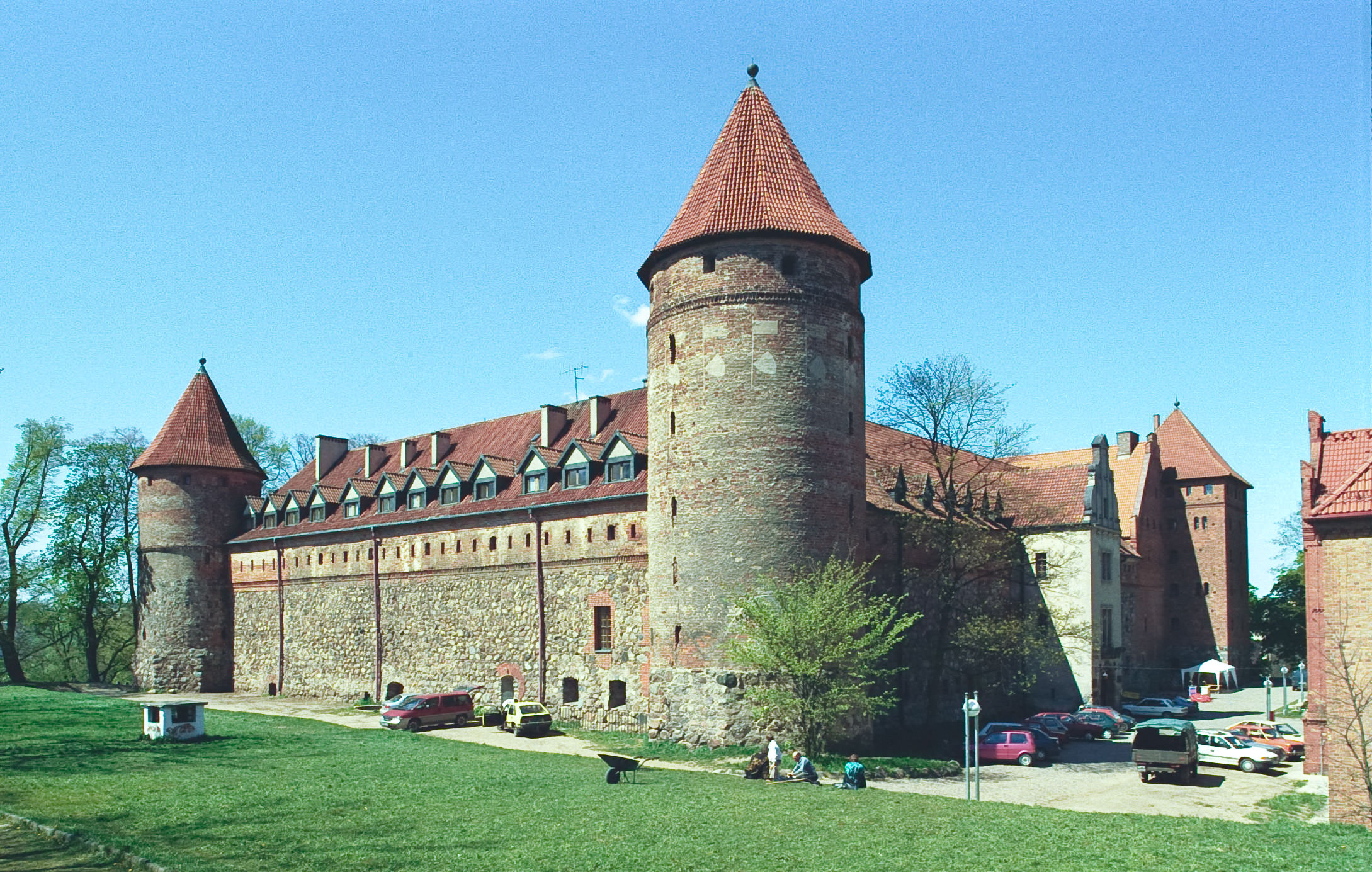 Bytów, zamek krzyżacki